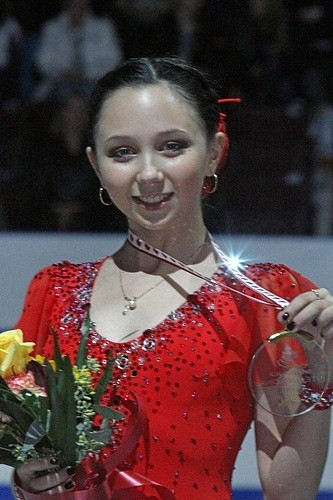 Елизавета Туктамышева с золотой медалью 2011 Skate Canada International